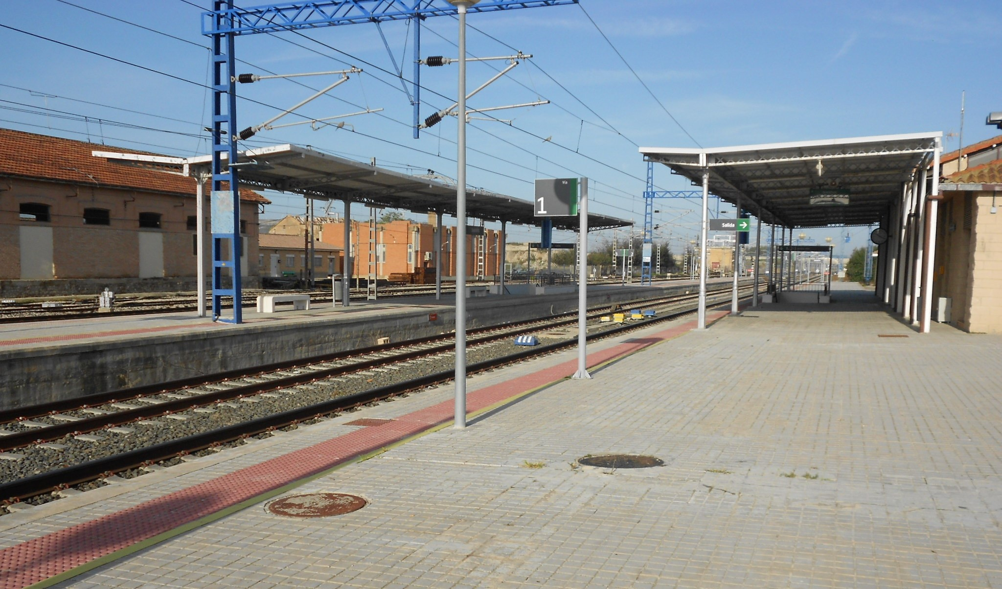 Estación ferroviaria de Tardienta (Aragón, España)